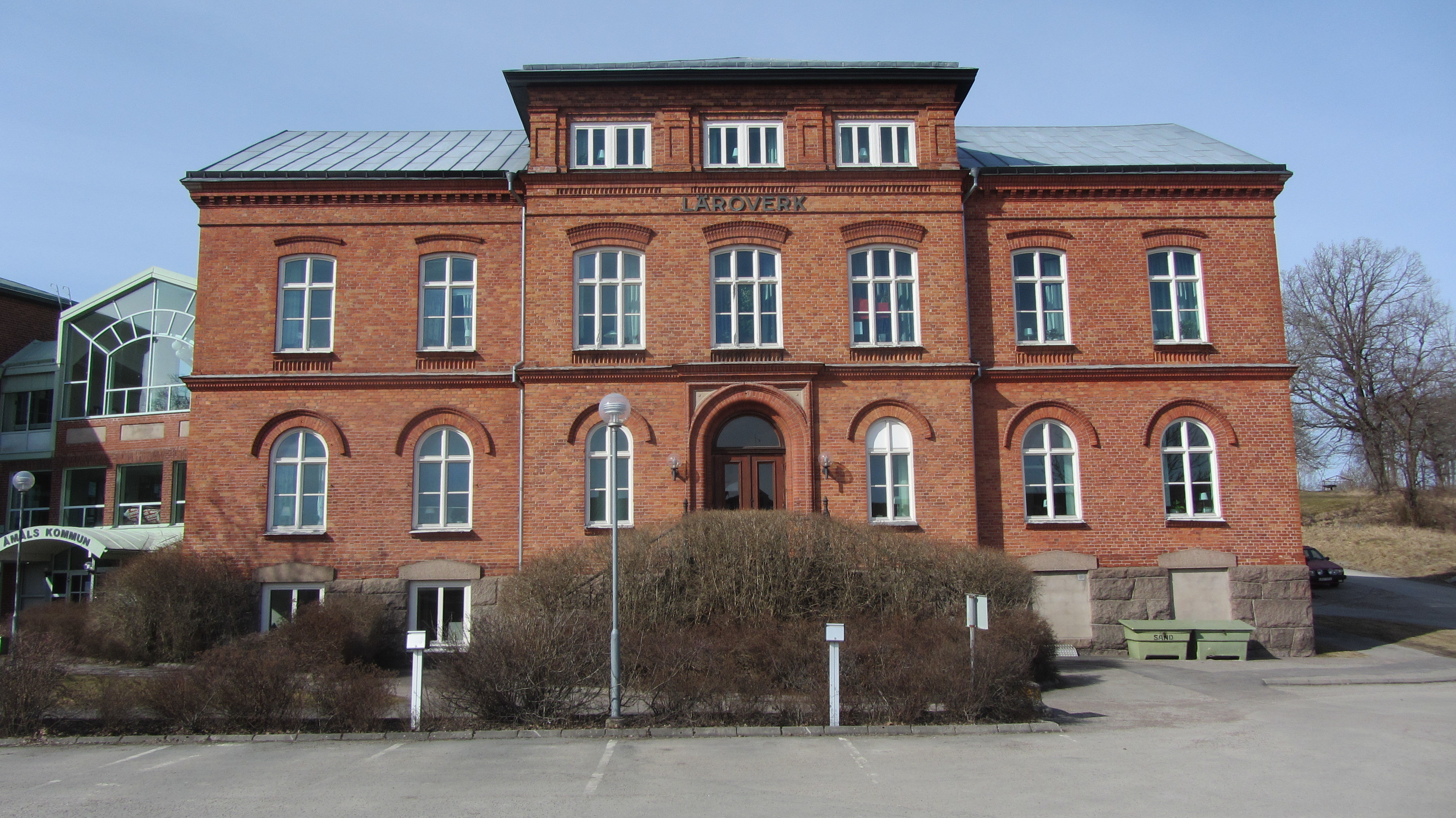 Åmåls gamla läroverk också känt som Norrtullsskolan. Uppfört 1902 vid Norrtullsgatan, senare ombyggt till kontorshus. Inhyser kontor för Åmåls kommun